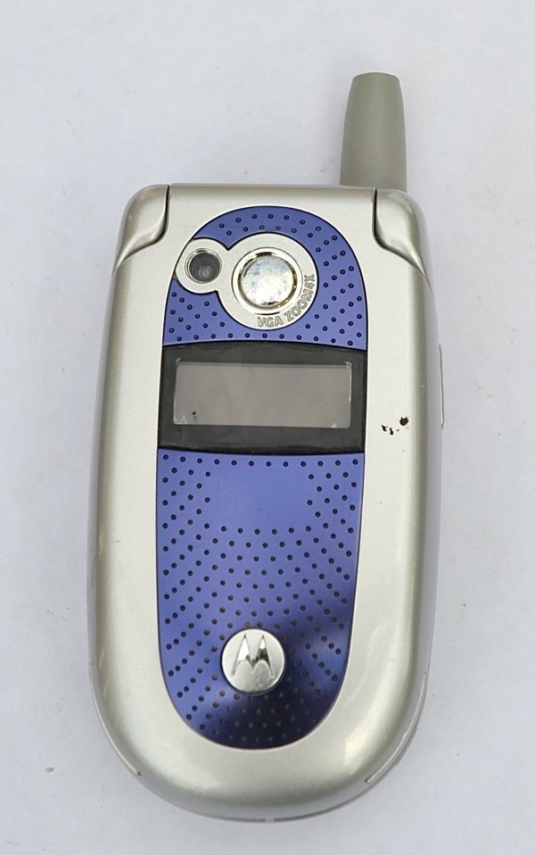 Oorspronkelijk Motorola V535, maar voor Vodafone als V550 in 2004 op de markt gebracht. Kleurenscherm, GPRS en video (640x480).